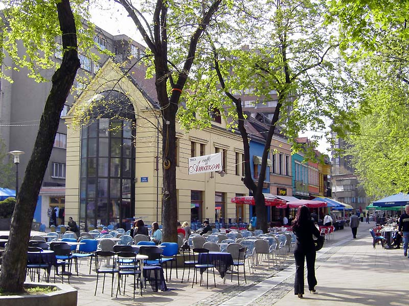 Zenica, Bosnia